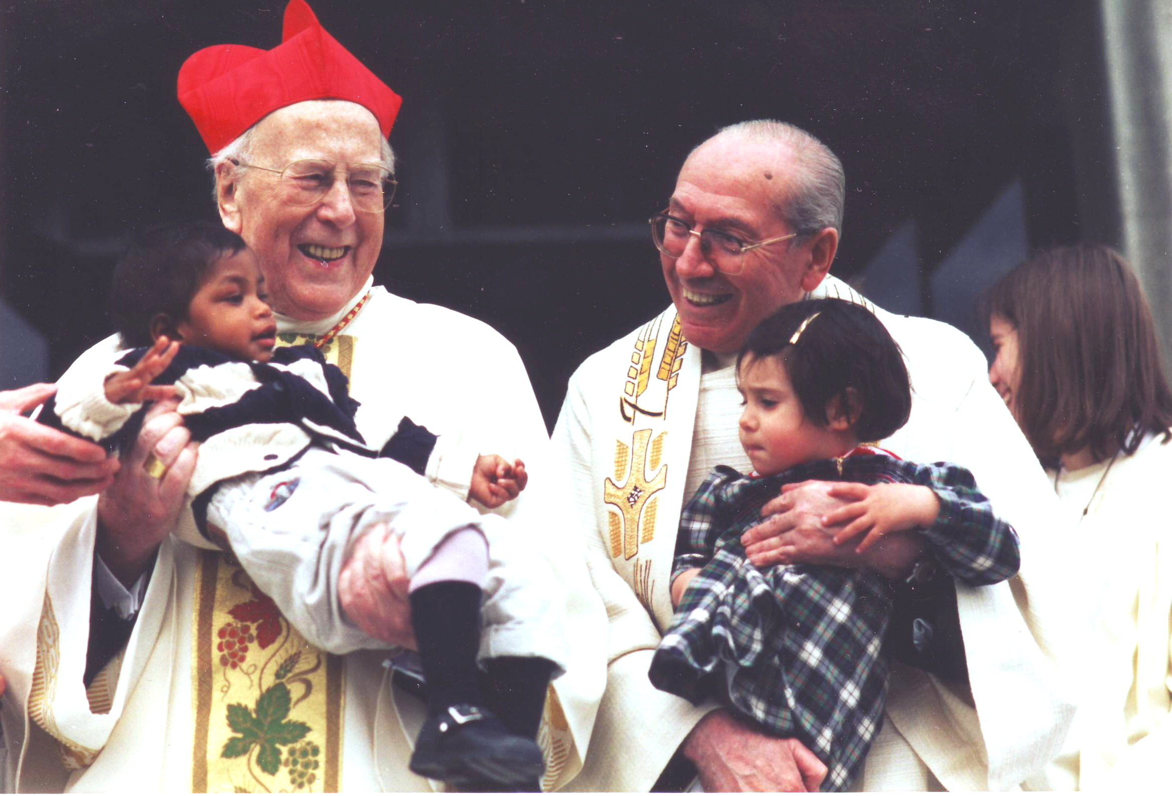 Franz Kardinal König mit Pfarrer P. Carlo Mondini OMV und 2 Flüchtlingskindern, Pfarrkirche Zum Guten Hirten, Wien Hietzing, 17.4.1994, Digitalisierung einer selbstgemachten analogen Aufnahme